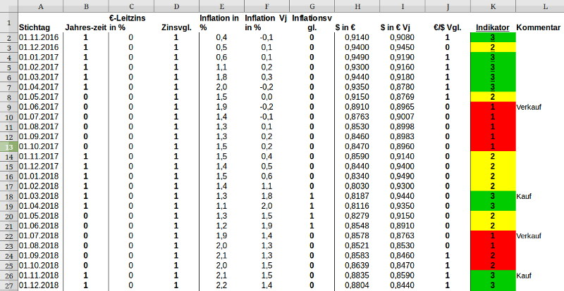 Teilindikatoren des Gebertindikators von 2016 bis 2018